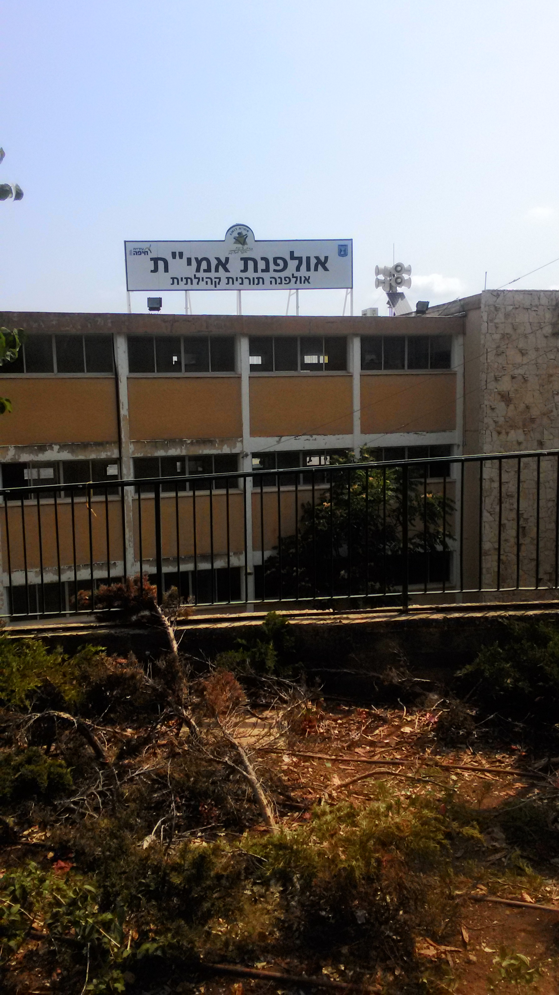 אולפנת אמי"ת בחיפה